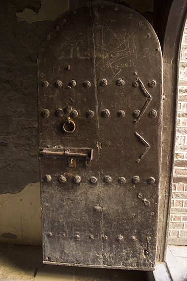 عد منزل الأمصيلي أحد أهم منازل رشيد الأثرية، يتميز بطراز معماري فريد وزخارف متميزة تحمل طابعًا خاصًا ومميزًا للحقبة التاريخية التي بُني بها. شيد المنزل عثمان أغا الطوبجى، عام 1223هـ - 1808م، وهو أحد قائديالجيش العثماني في رشيد، وآلت ملكيته بعد ذلك إلى أحمد الأمصيلي، والذى ينتسب إلى مدينة اماصيا بتركيا.